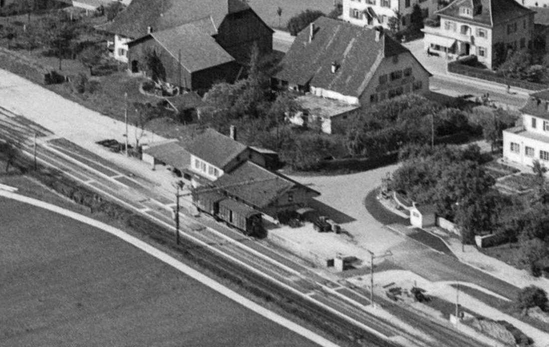 Détail d'une photo générale de Bassecourt montrant la gare ferroviaire